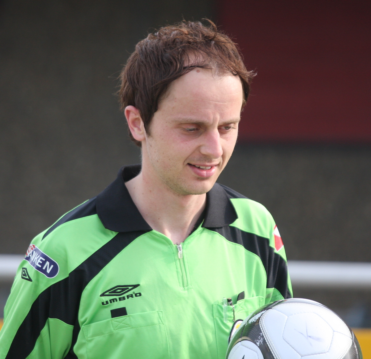 Jon Morten Tennøy